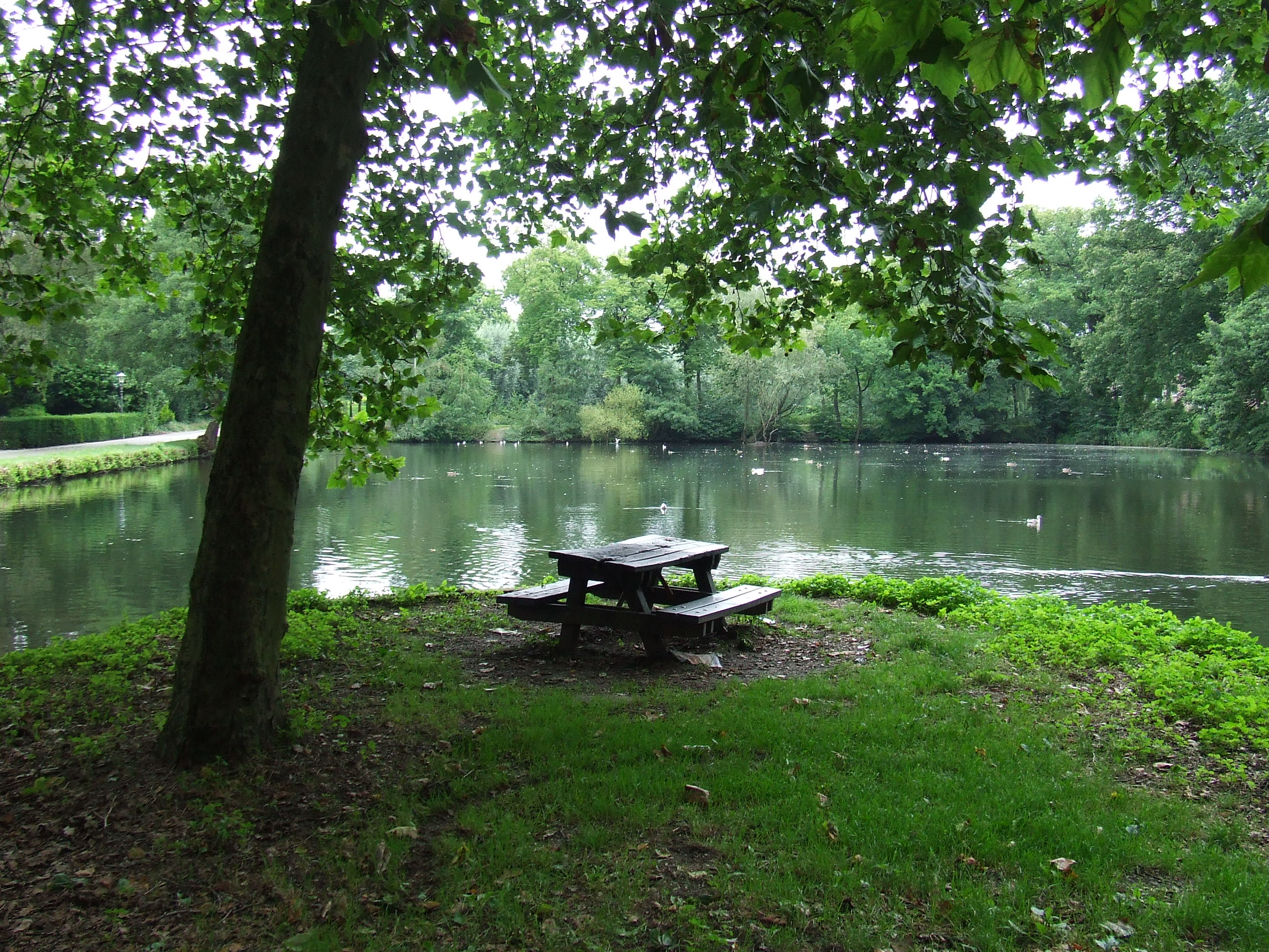 Molenvijver bij kasteel Holtmuhle Tegelen